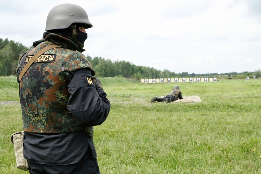 Тренировка батальона «Донбасс»